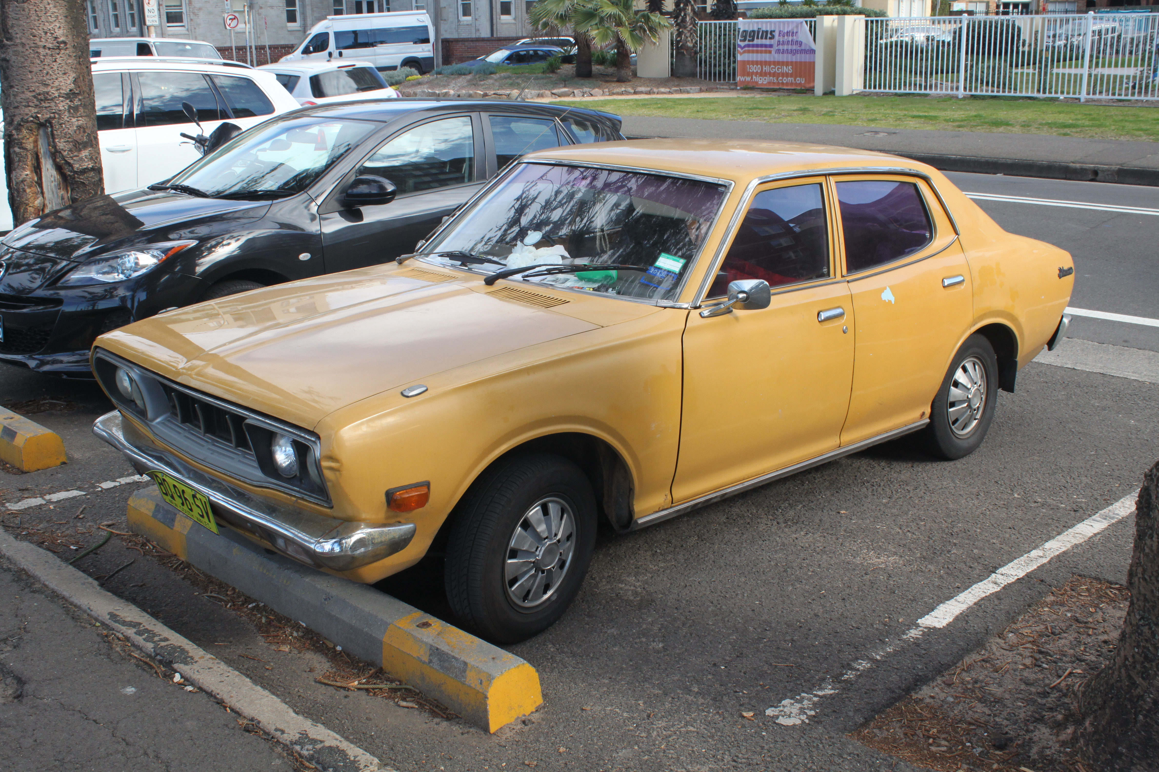 Datsun 180B 610